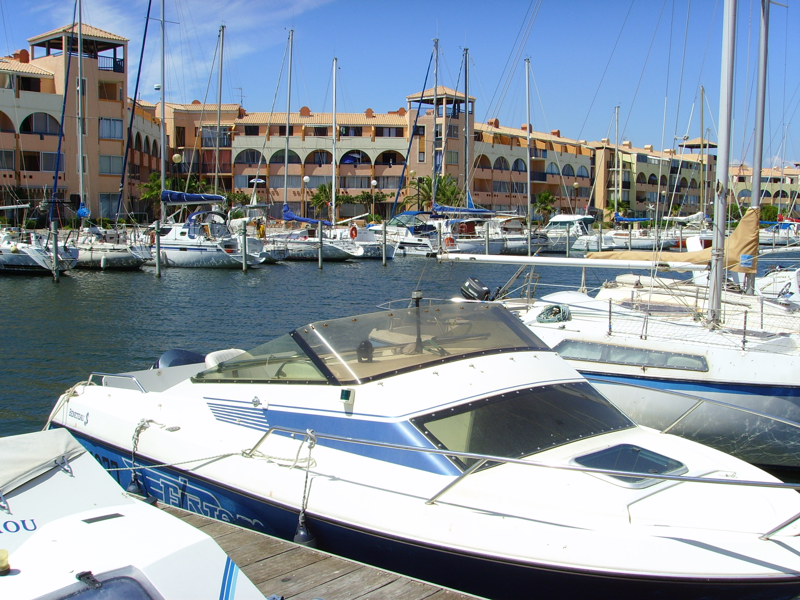 Leucate, Aude, France: Port Leucate photographer: Gerbil, summer 2006